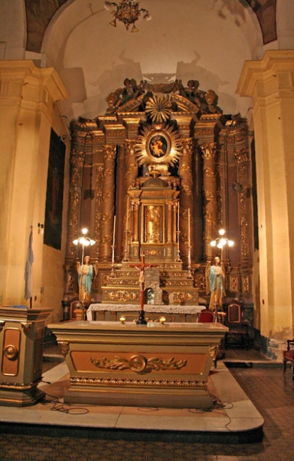 Altar principal de la Iglesia de San Roque, Córdoba, Argentina